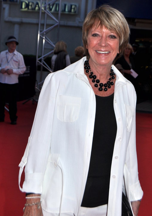 Alice Dona au festival de Deauville